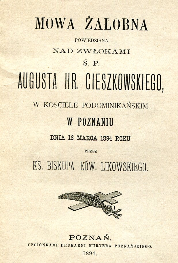 druk